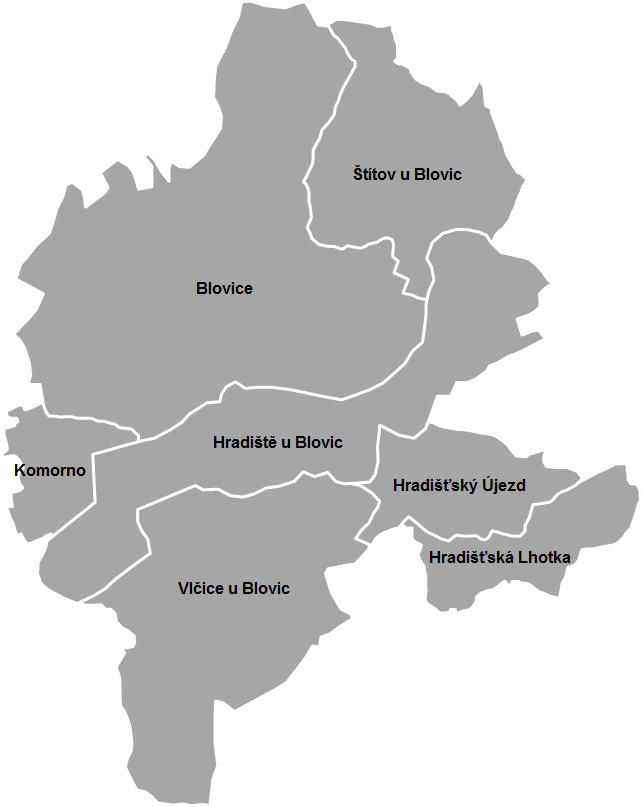 Mapa všech katastrálních území náležících městu Blovice